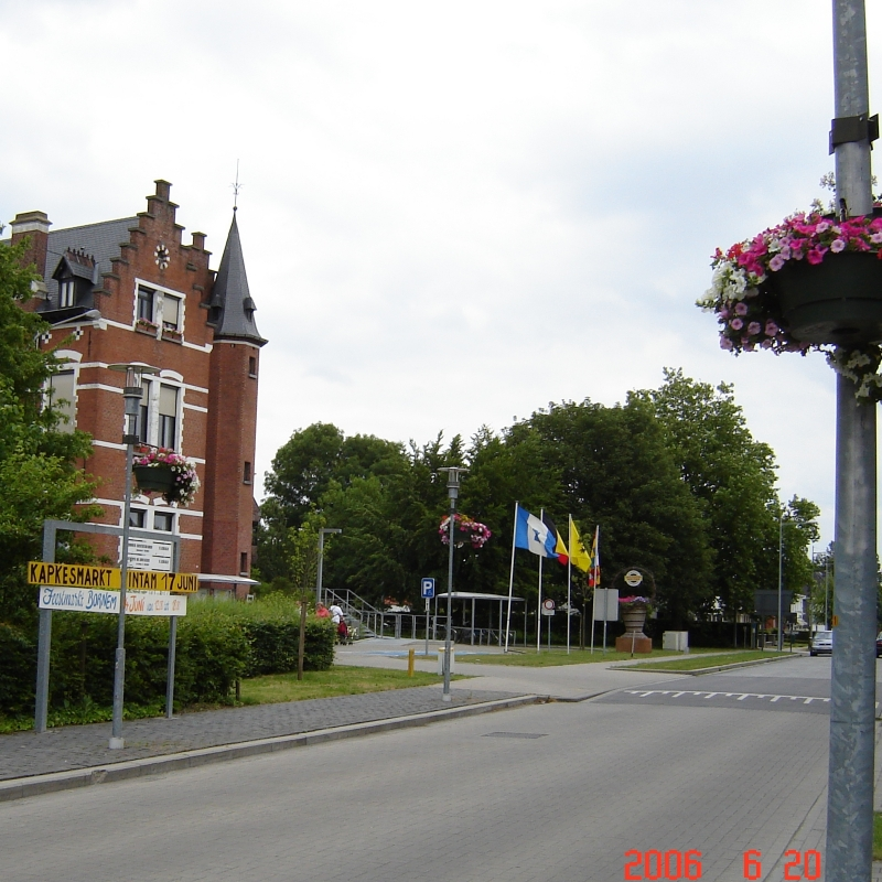 Bornem en Antverpenio. Mem farita foto dum ekskurso. Malgrandigita al formato 800 x 800.